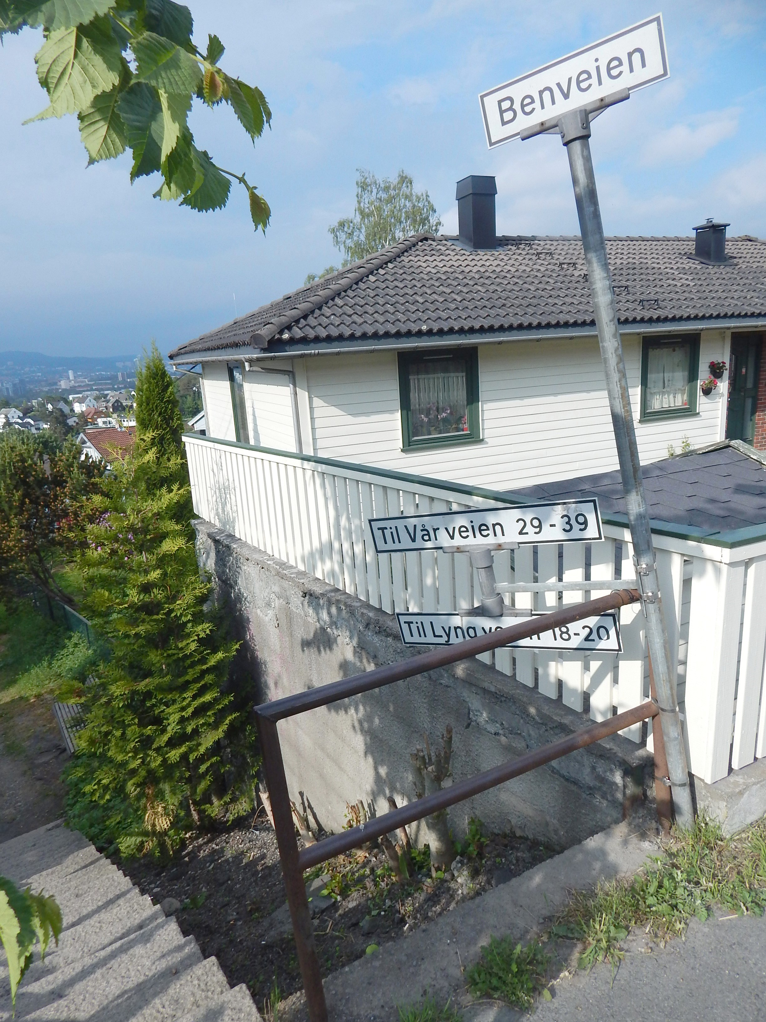 Benveien sett fra Lyngveien